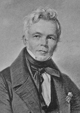 Karl Friedrich Schinkel